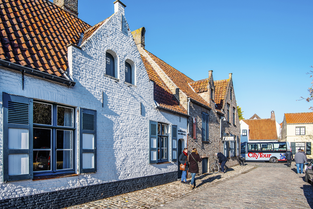 Hoofdgevel Volkskundemuseum Brugge, Schoenmakersrente